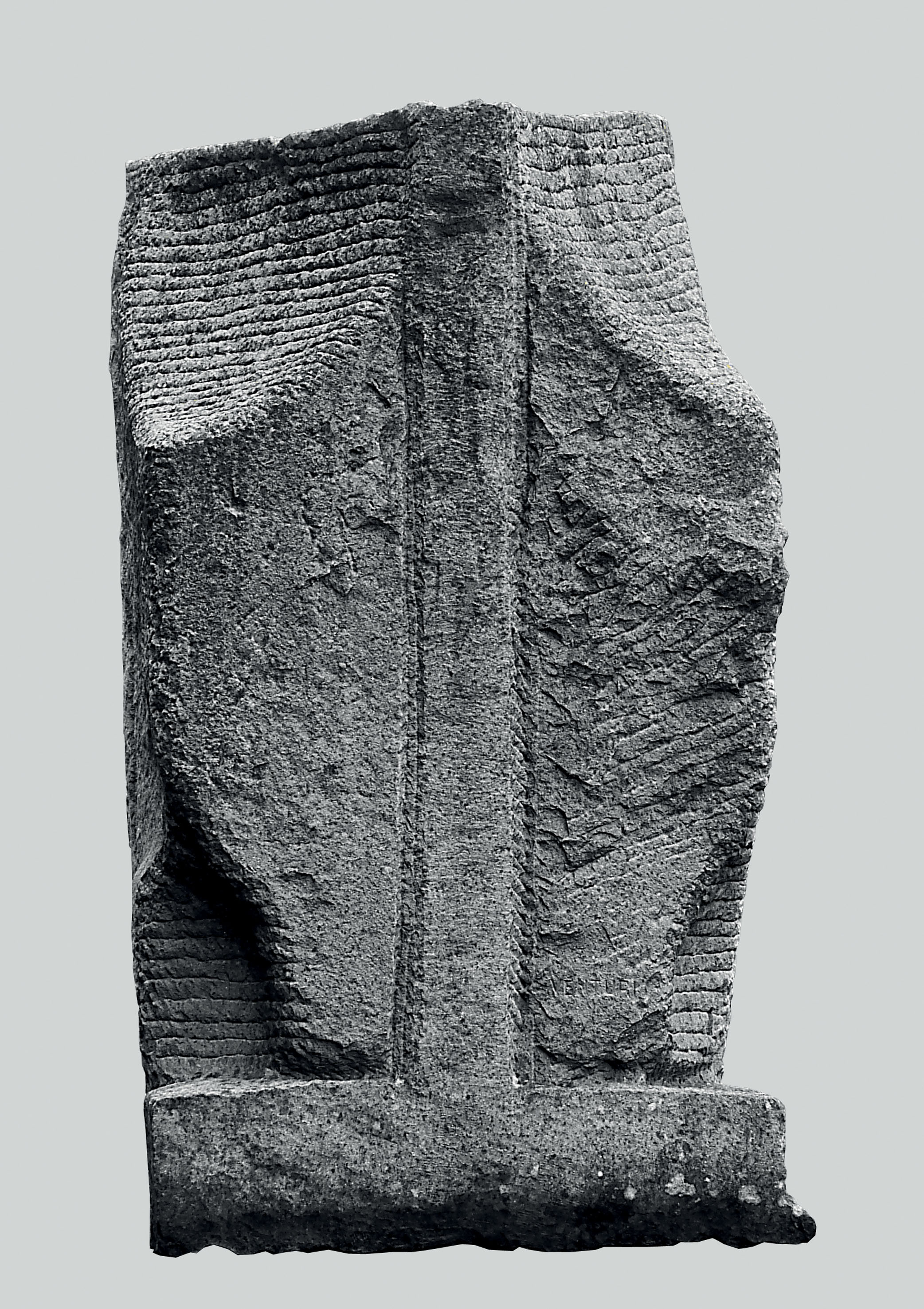 monumento